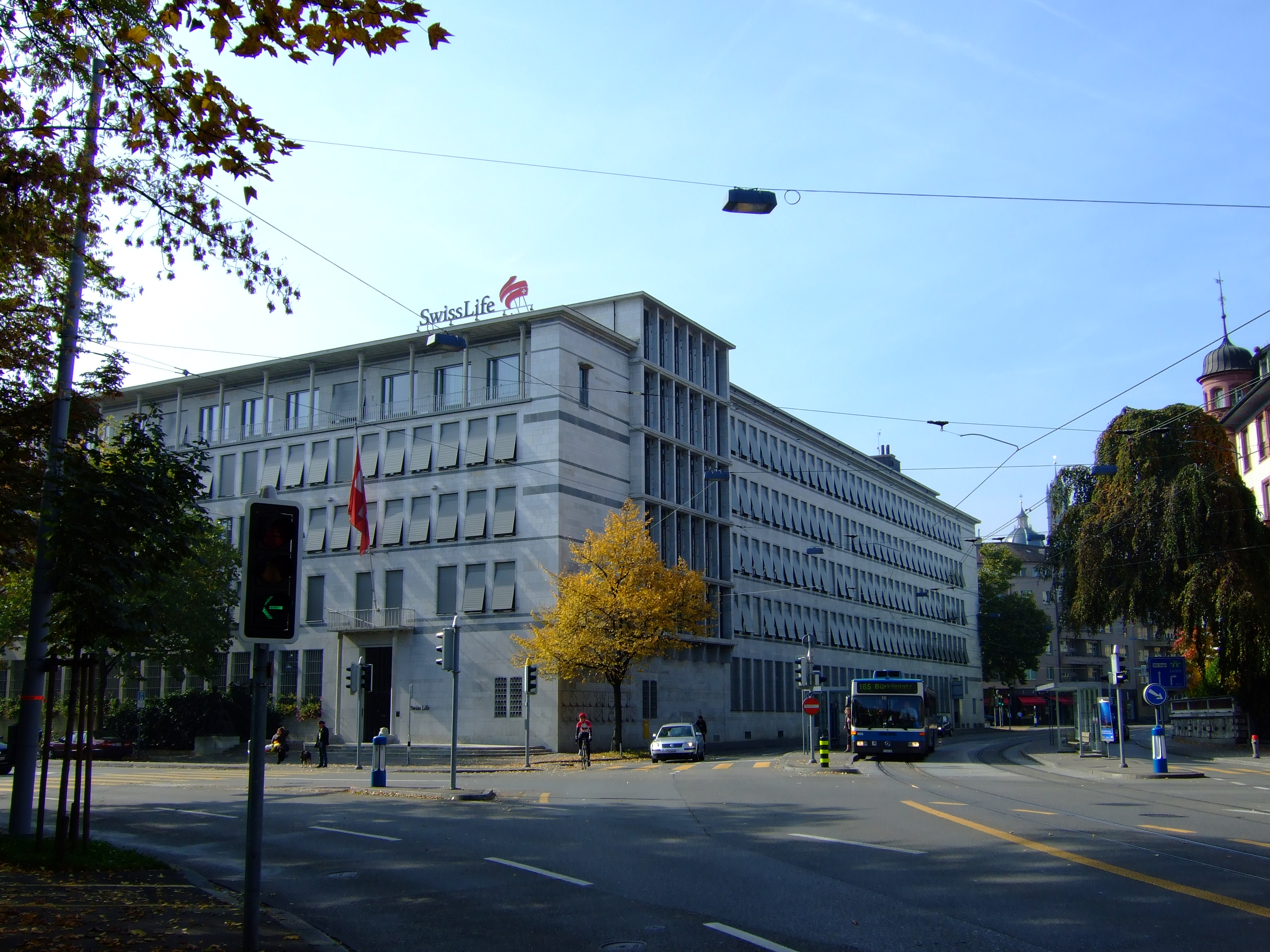 Gebäude der Swisslife ("Rentenanstalt") in Zürich am Mythen-Quai. Erbaut 1937-1940 von Otto (1880-1959) und Werner Pfister (1884-1950) für die Schweizerische Lebensversicherungs- und Rentenanstalt. Unter Denkmalschutz seit 1995